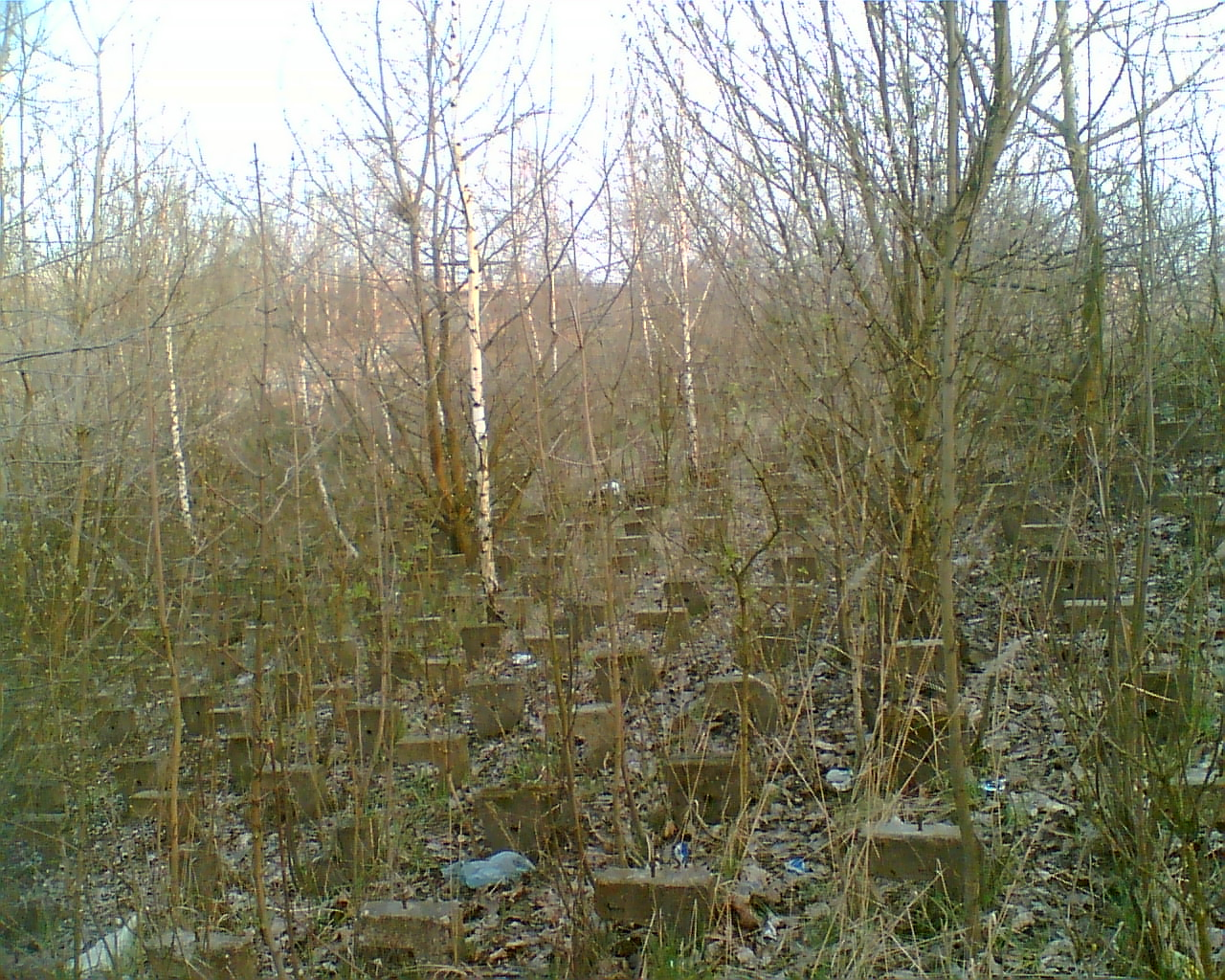 Trybuny stadionu na Dolnej Wildze okres świetnosci mają za sobą